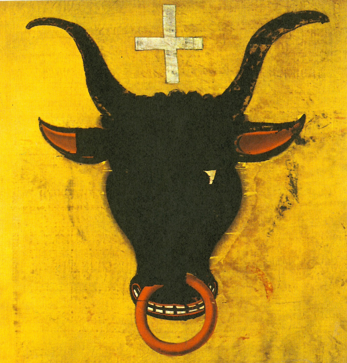 Wappen Kanton Uri Aus dem Sempacher Schlachtbanner 1386